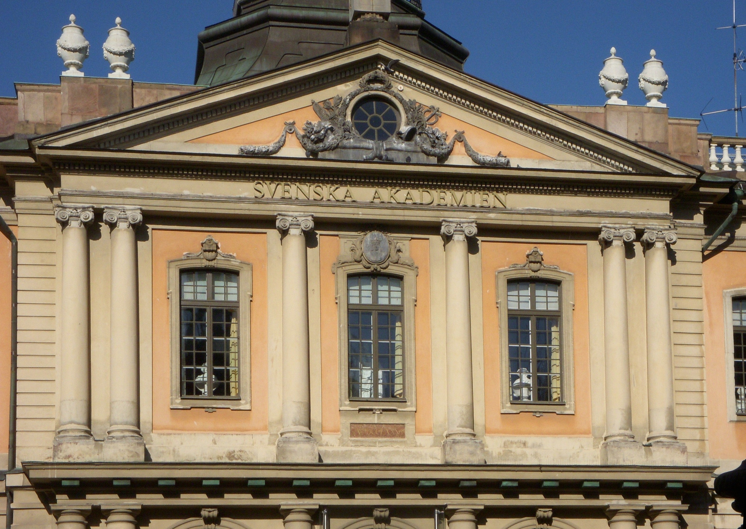 Stortorget Gamla Stan, Börshusets frontespis